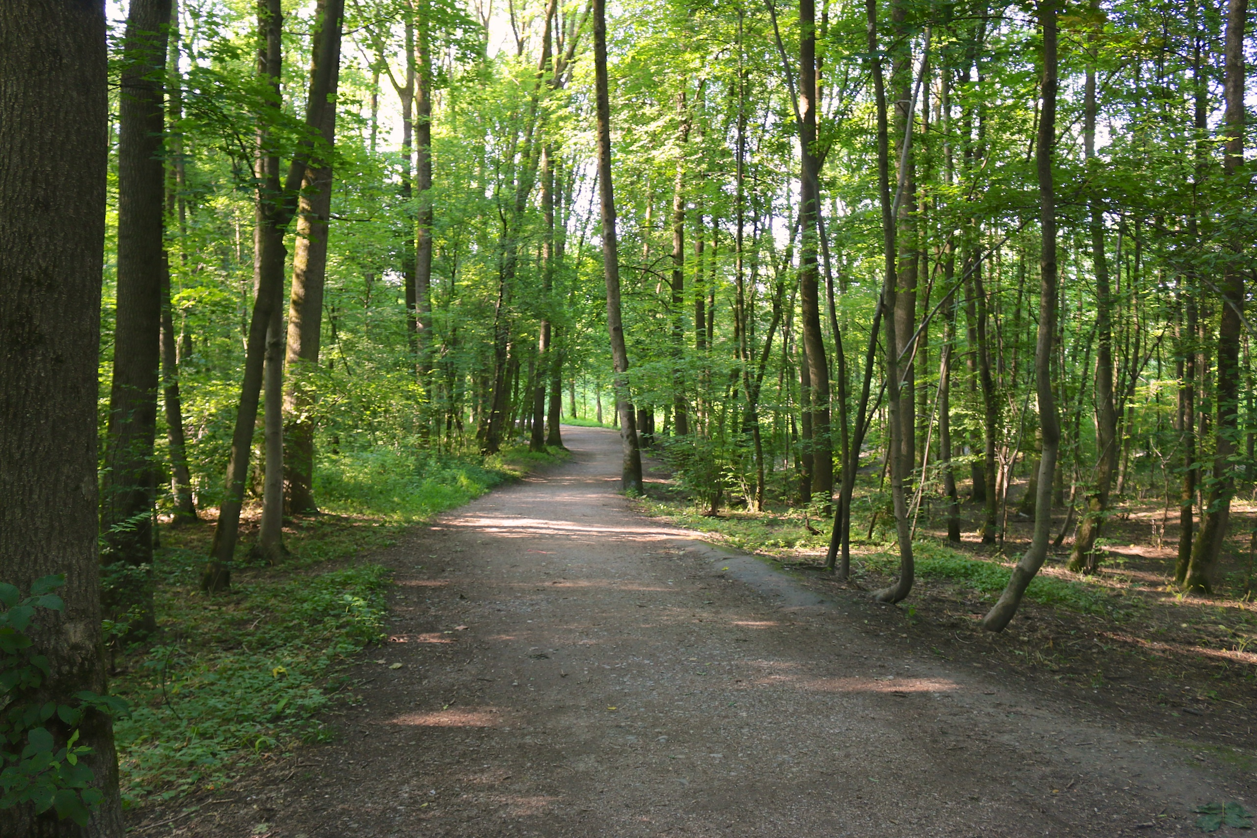 Spazierweg durch den Mischwald in der Josefiau This media shows the Geschützter Landschaftsteil in Salzburg with the ID GLT00029.